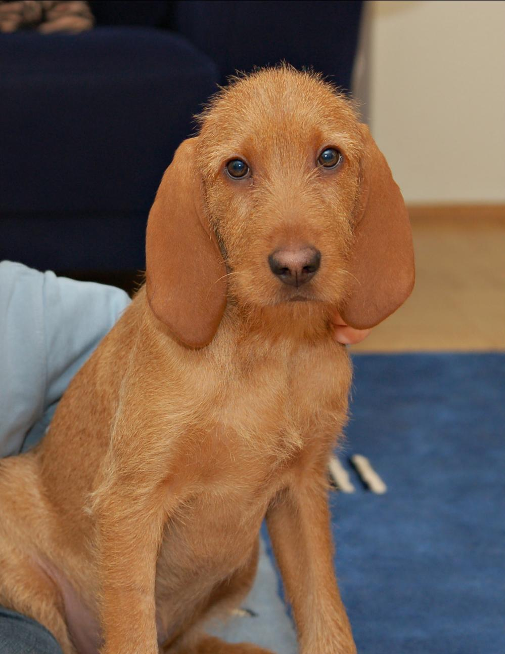 Griffon Fauve de Bretagne, 6 Month